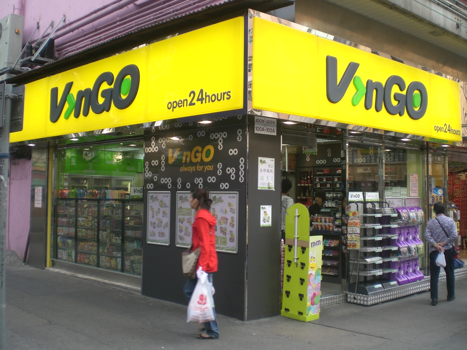 筲箕灣望隆街華潤萬家便利商店, Mong Lung Street, Shau Kei Wan, Hong Kong